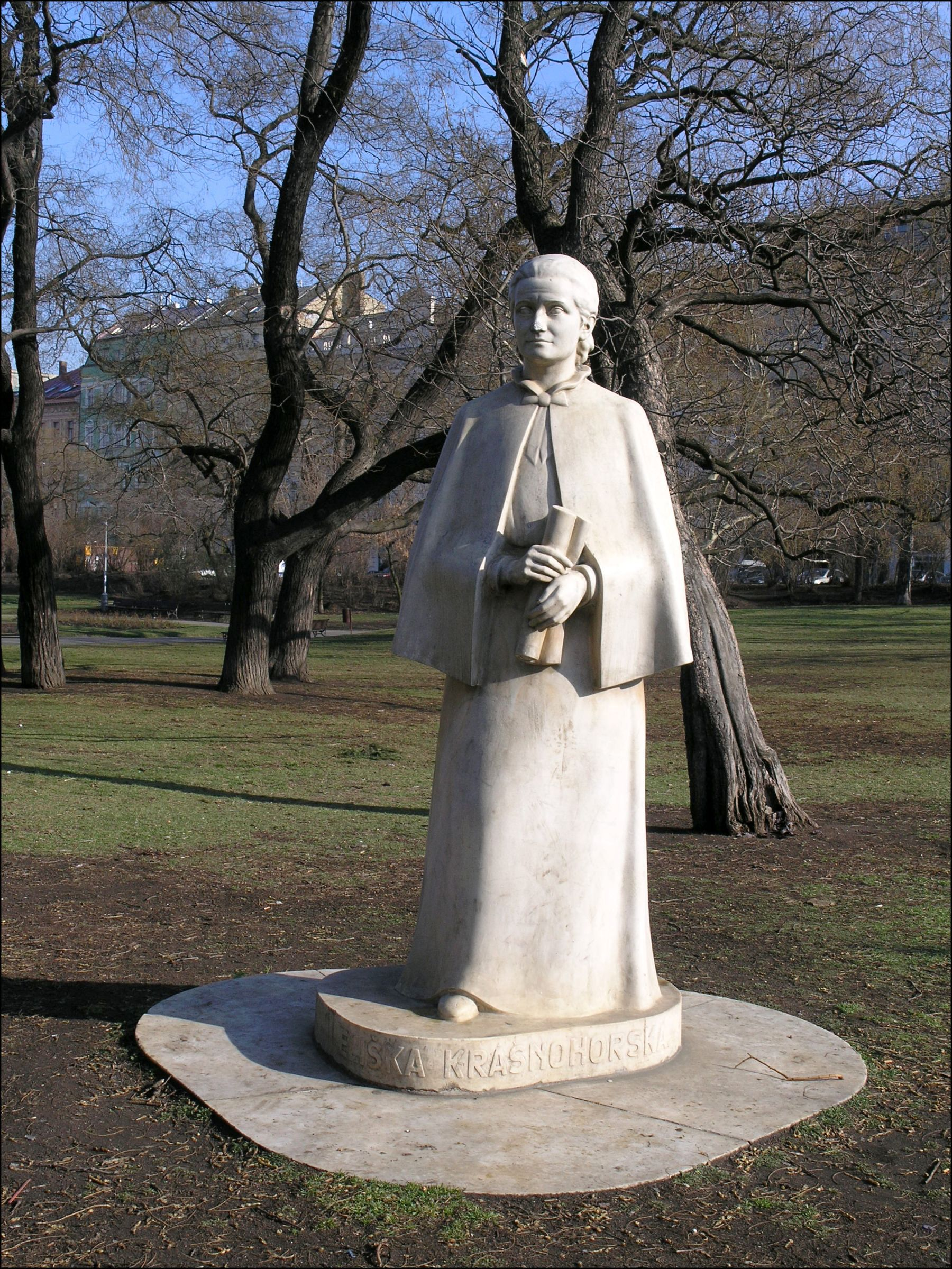 Praha, Karlovo náměstí - socha Elišky Krásnohorské